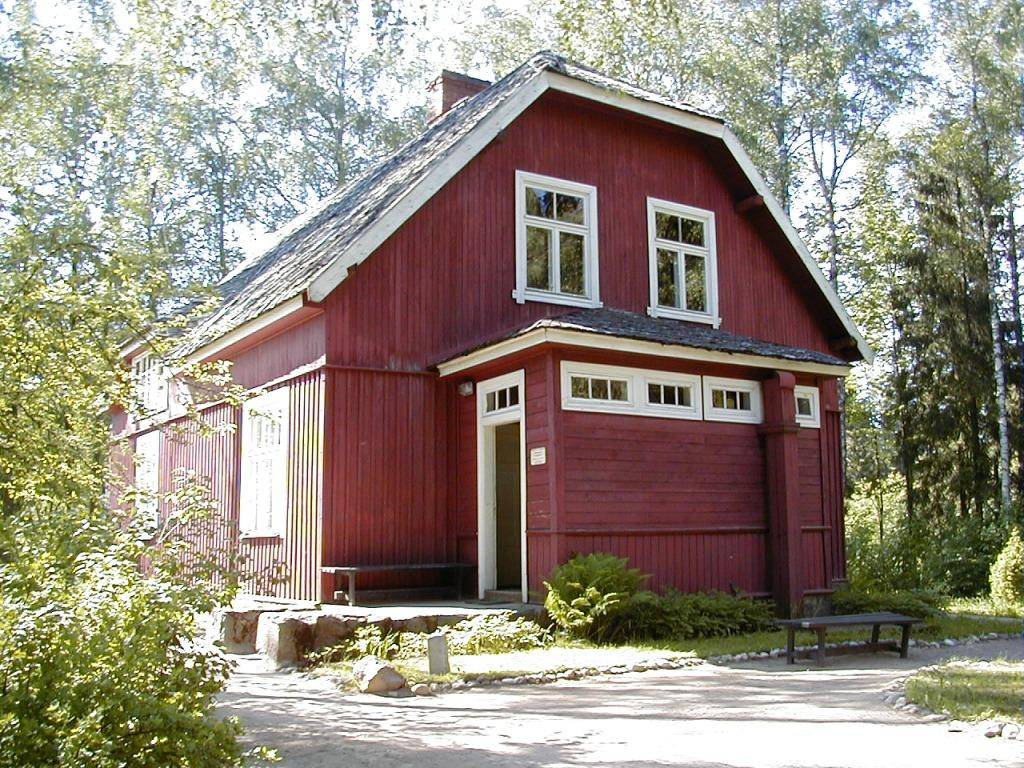 Vecpiebalga, K. Skalbes muzejs "Saulrieti" 2000-05-27